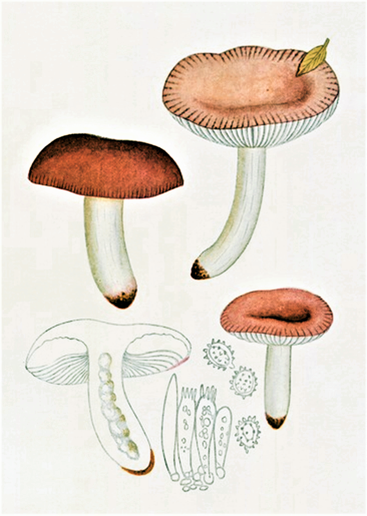 Giacomo Bresadola: Russula carnicolor (Bres.) Bataille (1908), heute Russula lilacea Quél. (1877)